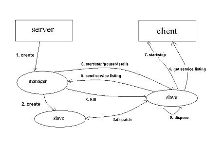 Monitoreo de servicios